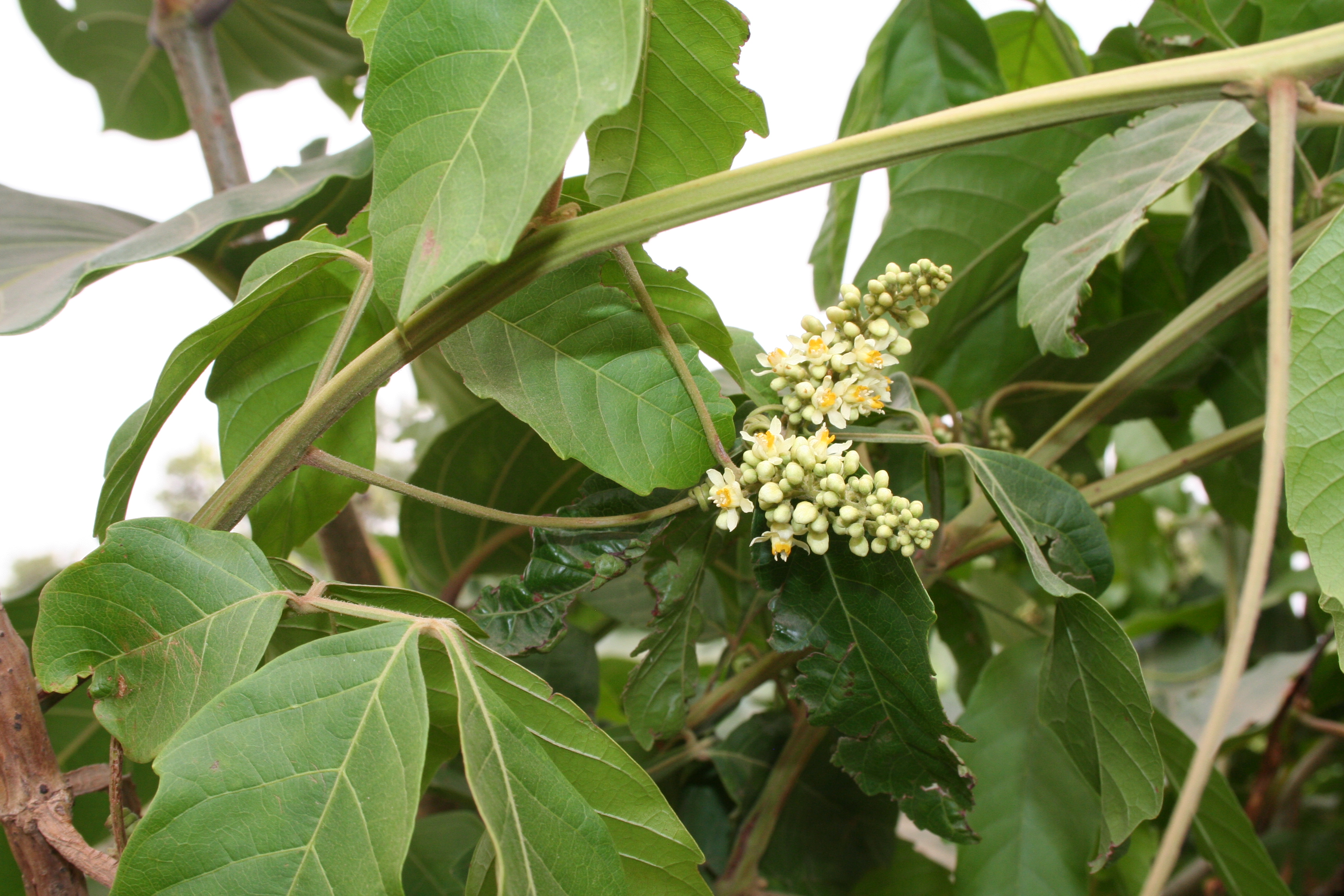 inflorescences of Paullinia pinnata, near F.Cl. de Patako, Senegal